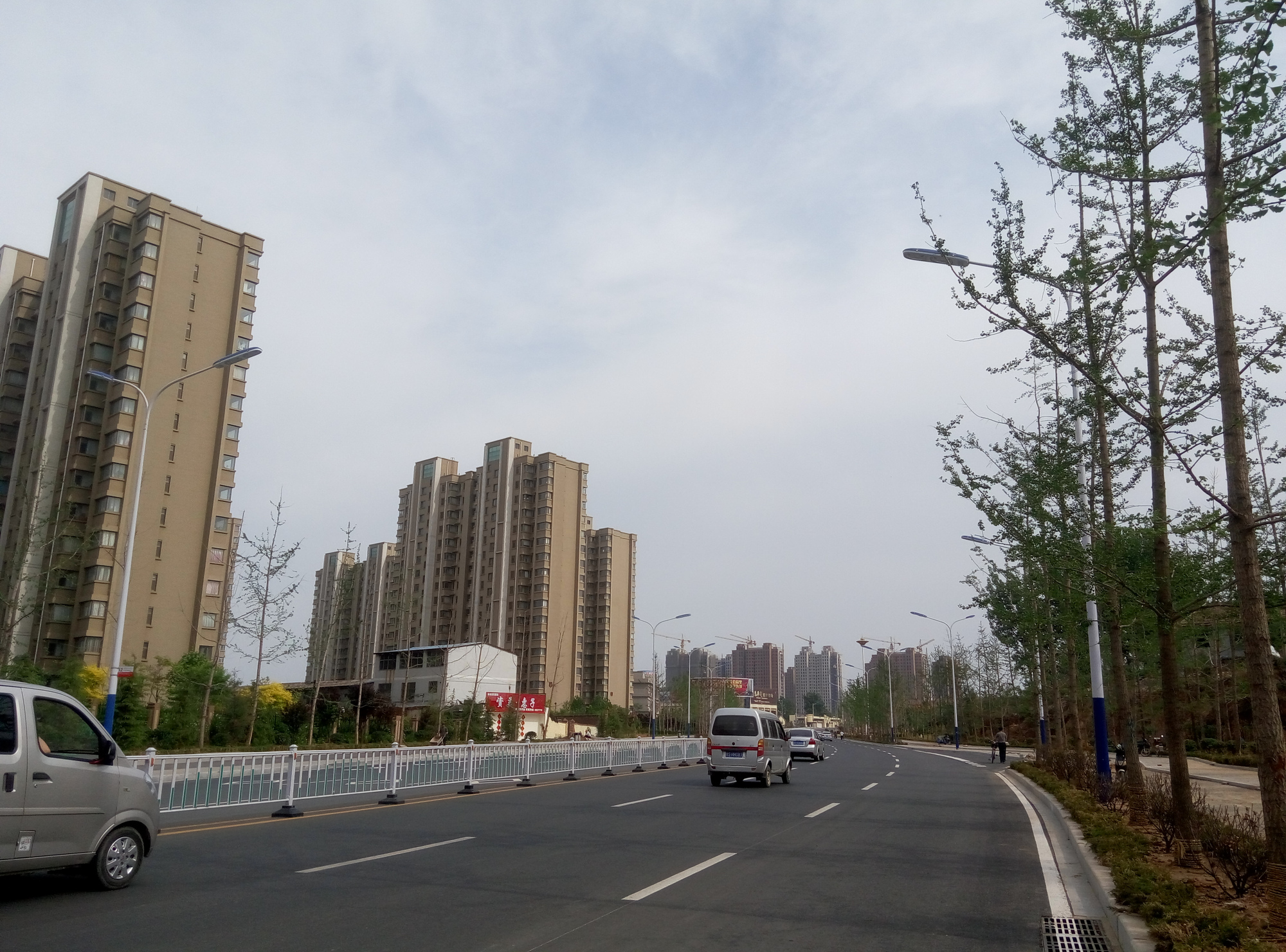 莱芜市街景，图中为都市花园小区。